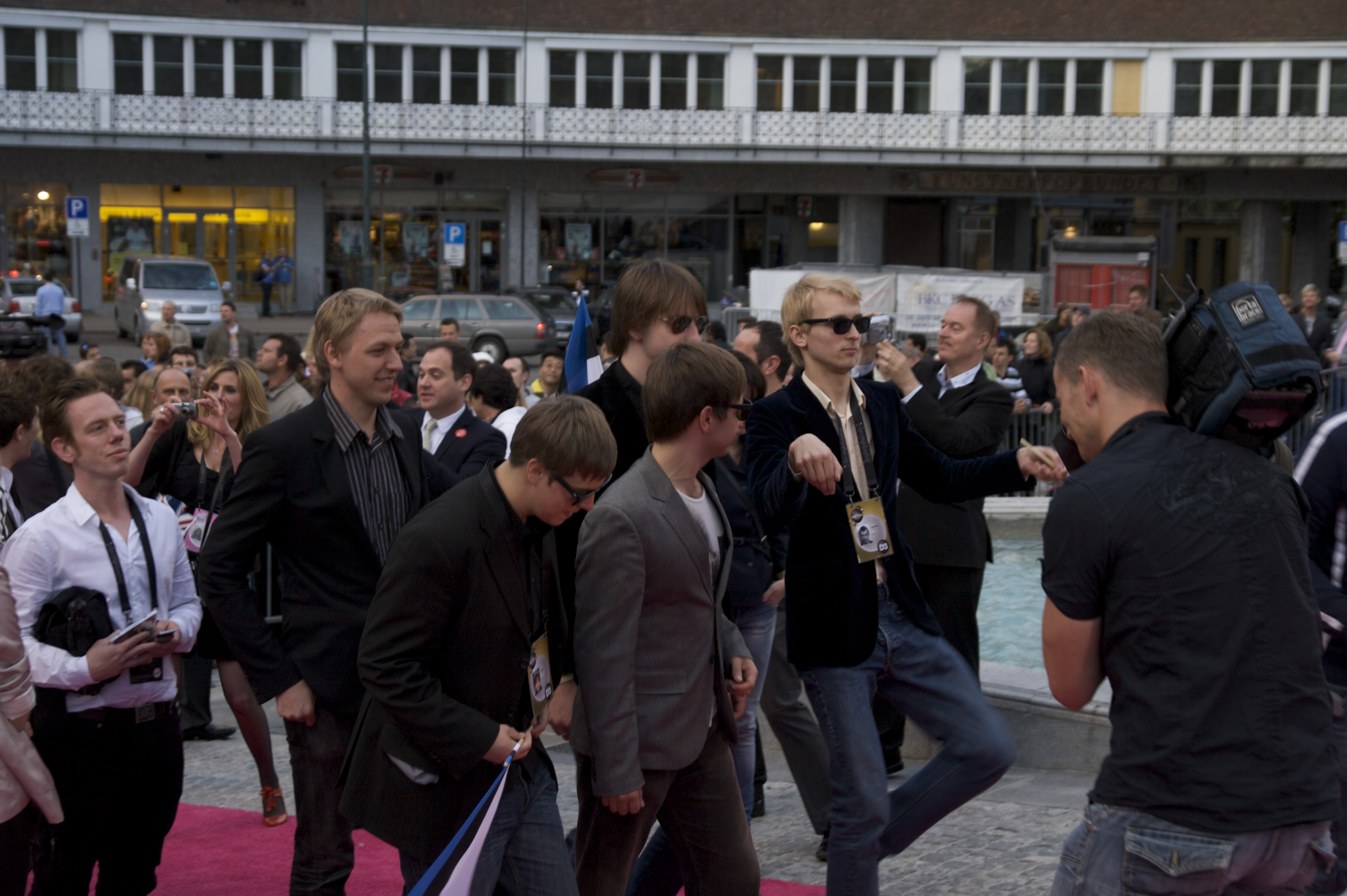 Estonian band Malcolm Lincoln in Oslo. Foto: Vincent Hasselgård, Aktiv I Oslo.no